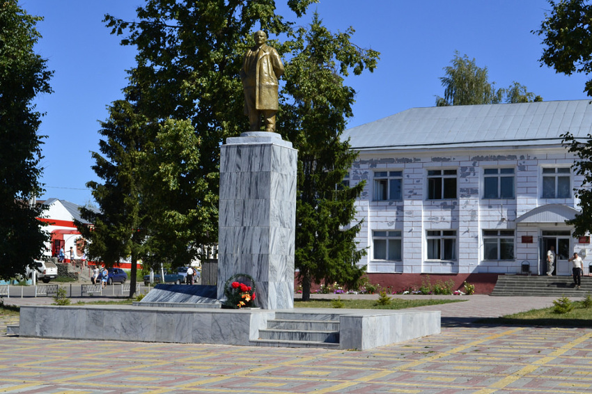 пиПичаево